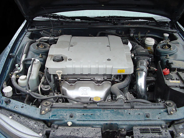 Mitsubishi Galant EA0 Motor 2.4 GDI